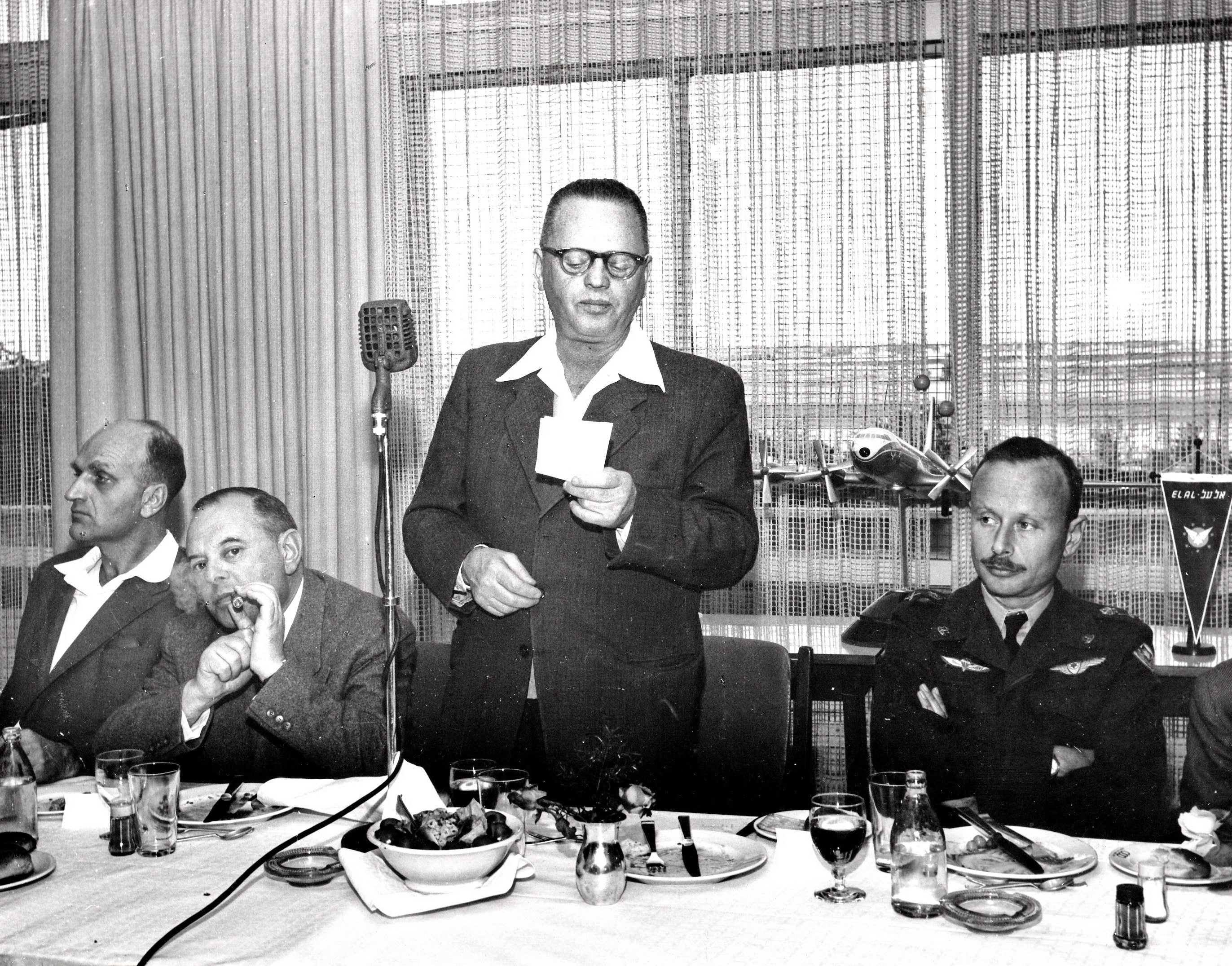 ז. און בטקס קבלת מטוס נוסעים בריטניה באל על. מימין דן טולקובסקי מפקד חיל האויר. 22.12.1957 לוד